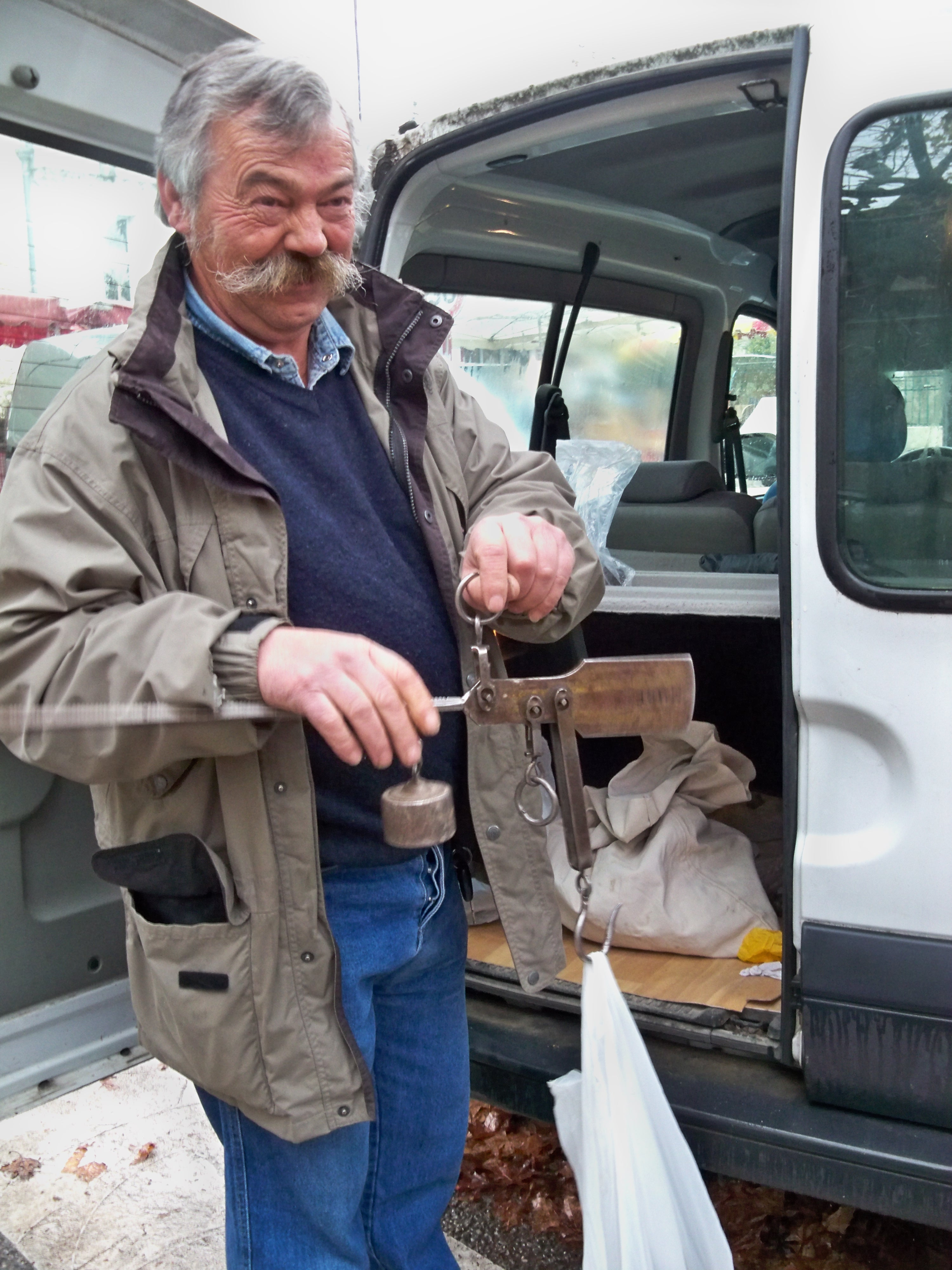 Pesée de truffes pour la ventes